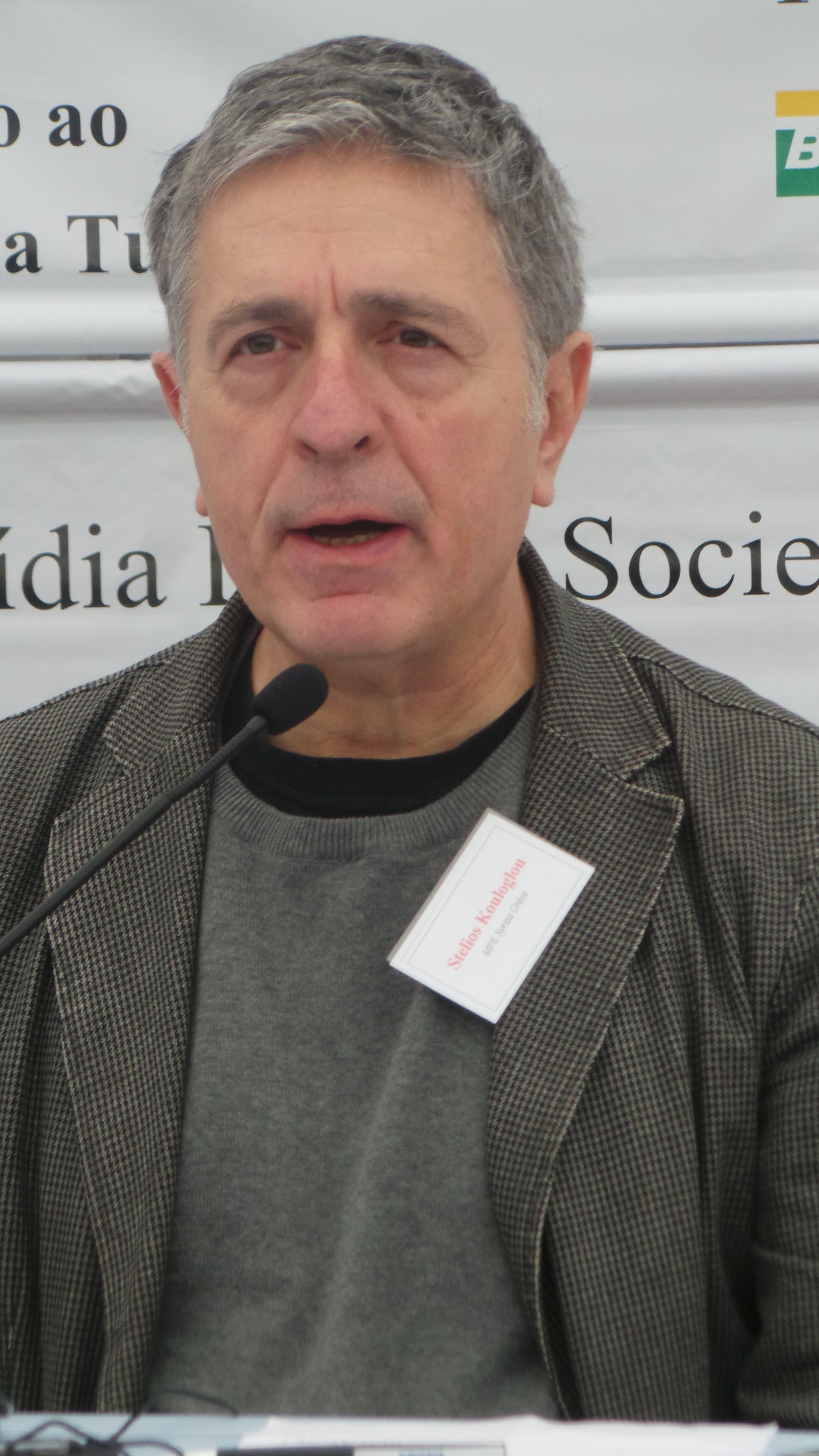 Lectura de la Carta Mundial de Medios Libres aprobada durante la sesión de clausura del FMML en Túnez durante la reunión del Foro Social Mundial 2015